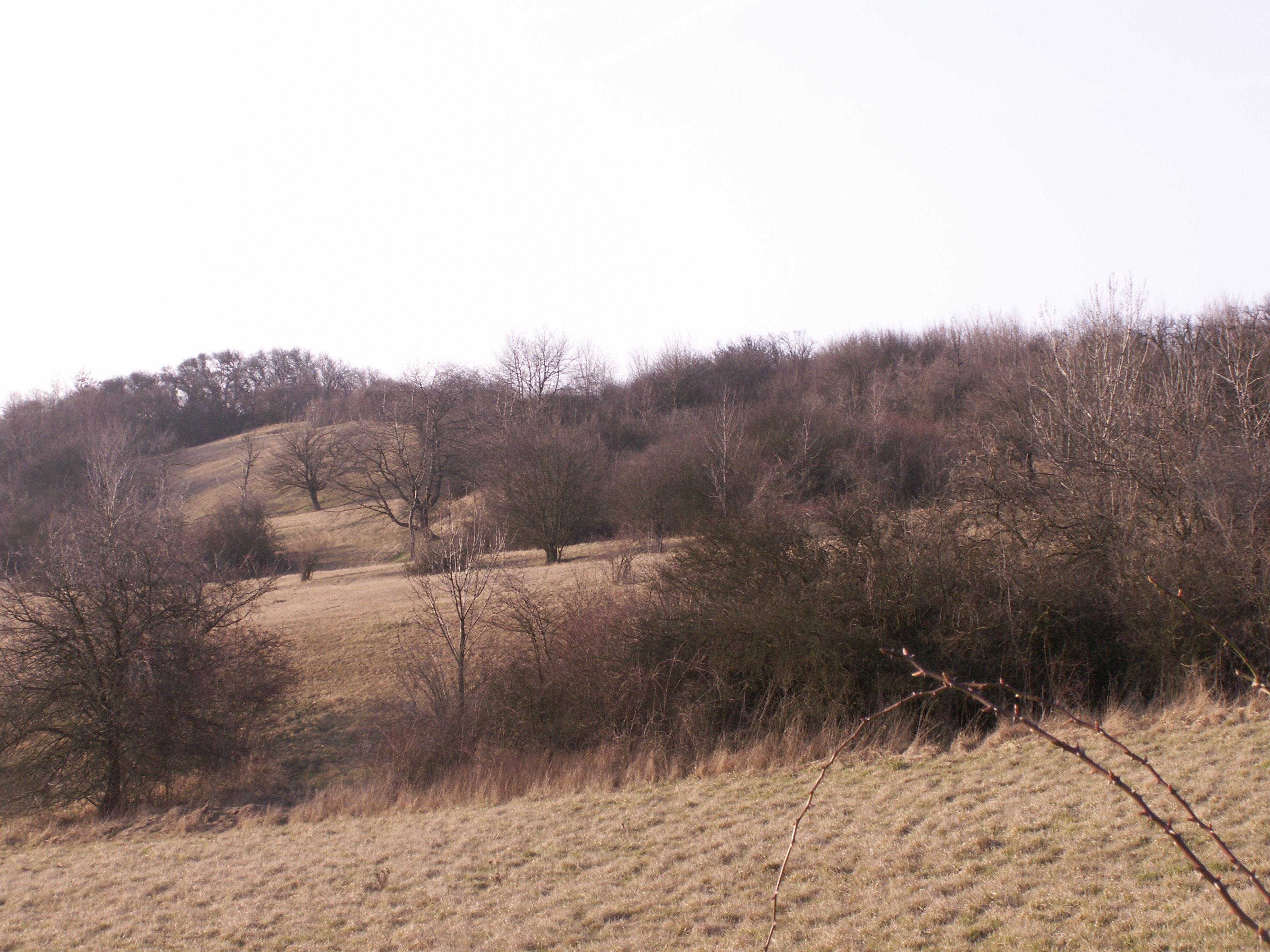 přírodní rezervace Zouvalka, okres Vyškov